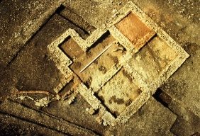 Wurmlingen. Das römische Badegebäude mit den Pfostenlöchern des späteren germanischen Speicherbaues